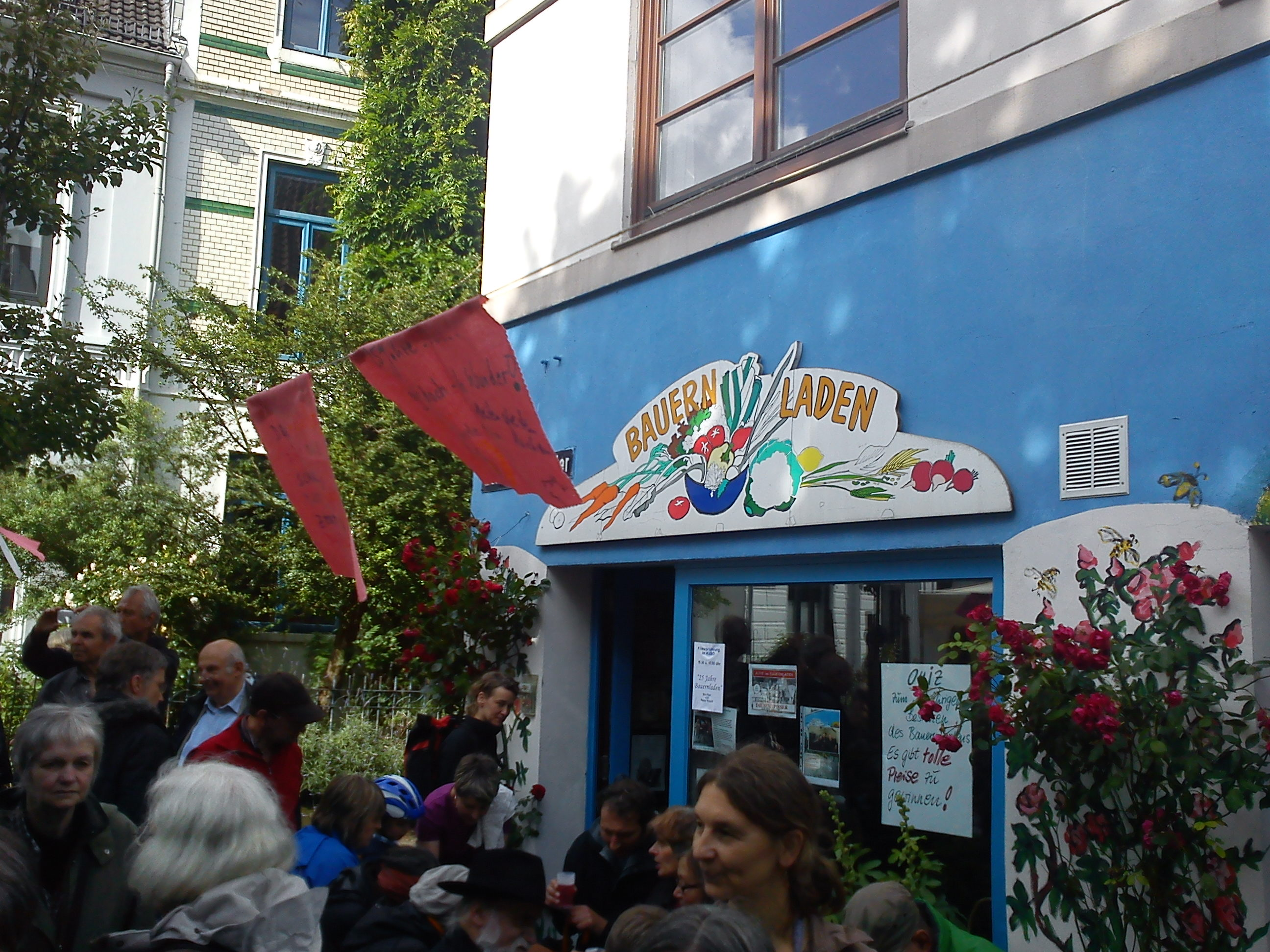 EVG Bauernladen im Paulskloster 28, Bremen